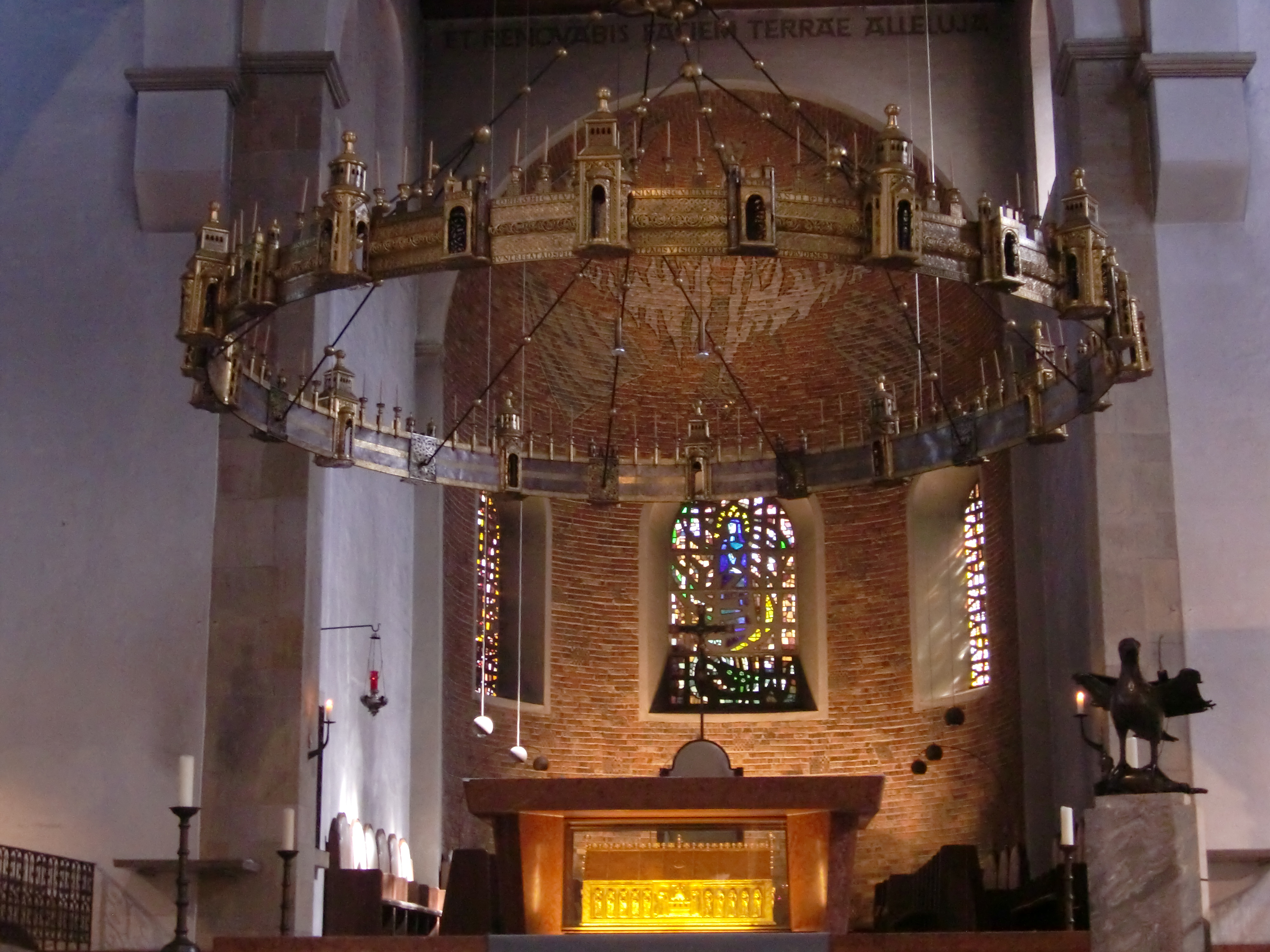 Dom zu Hildesheim, Hochaltar aus roten Marmor, mit Epiphaniusschrein, 1. Hälfte 12. Jhd., oben ein Heziloleuchter (romanische Leuchterkrone)